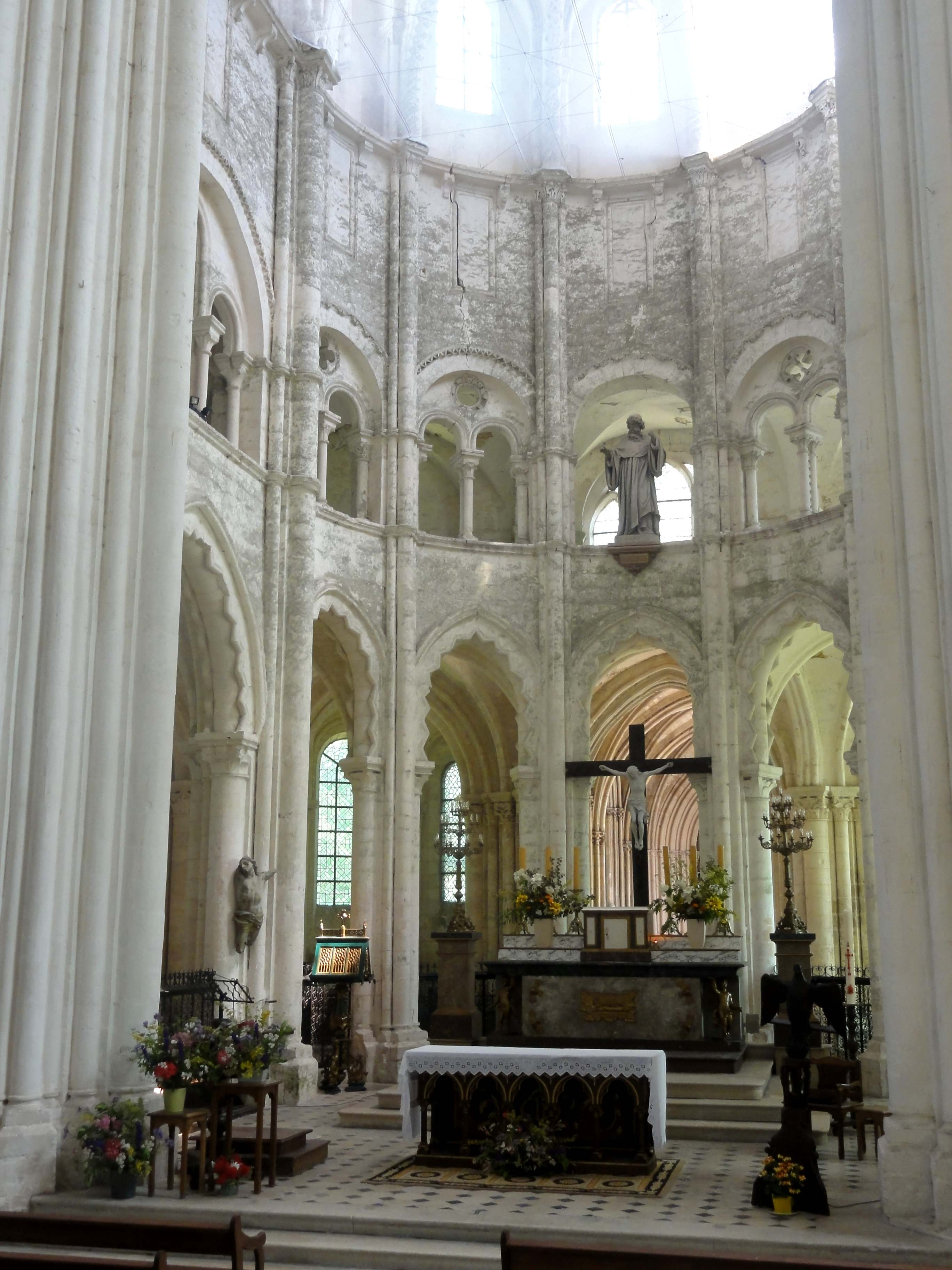 Chœur de l'abbatiale - voir le titre du fichier.